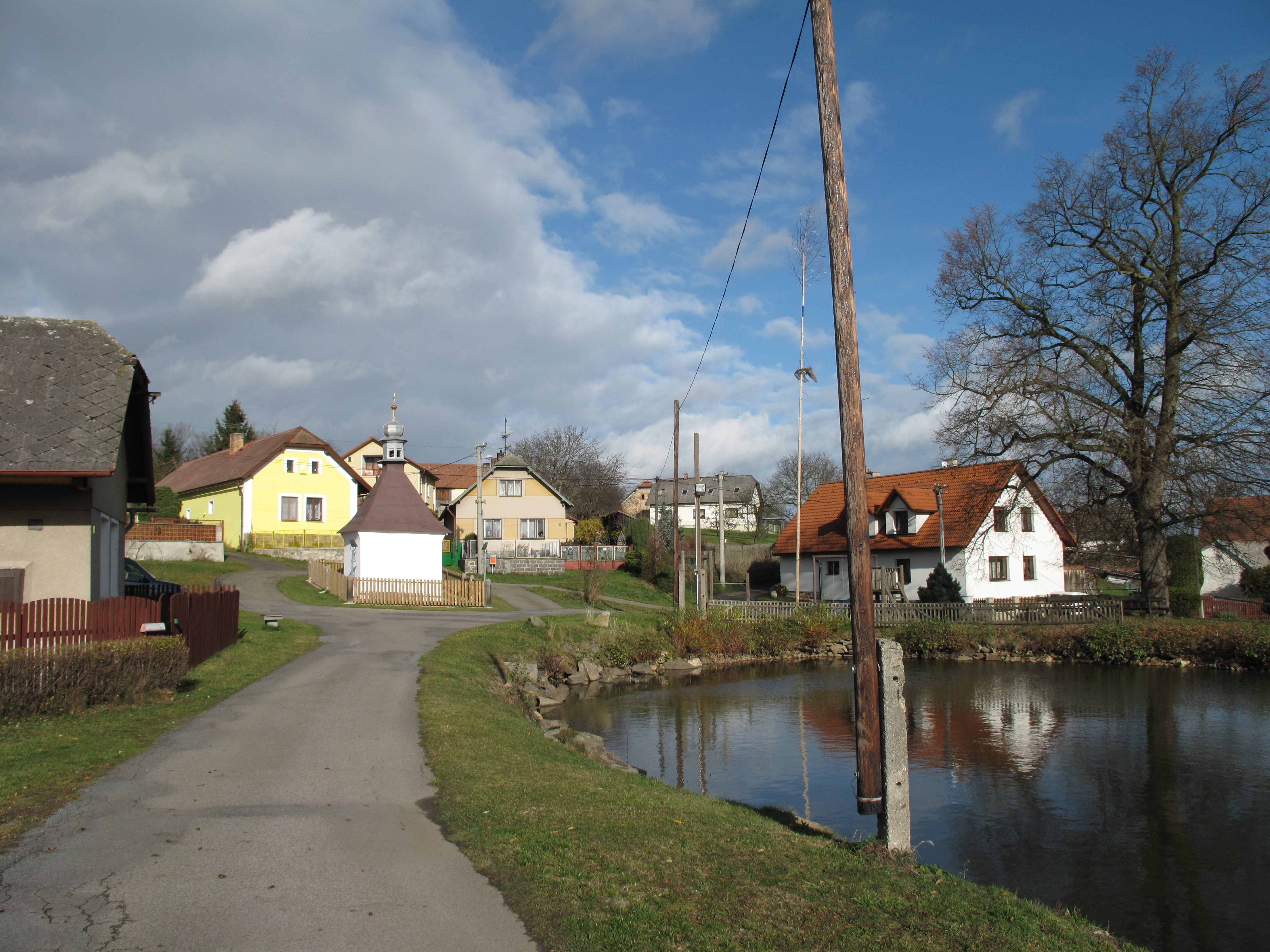 Náves v Lažanech. Okres Benešov, Česká republika.